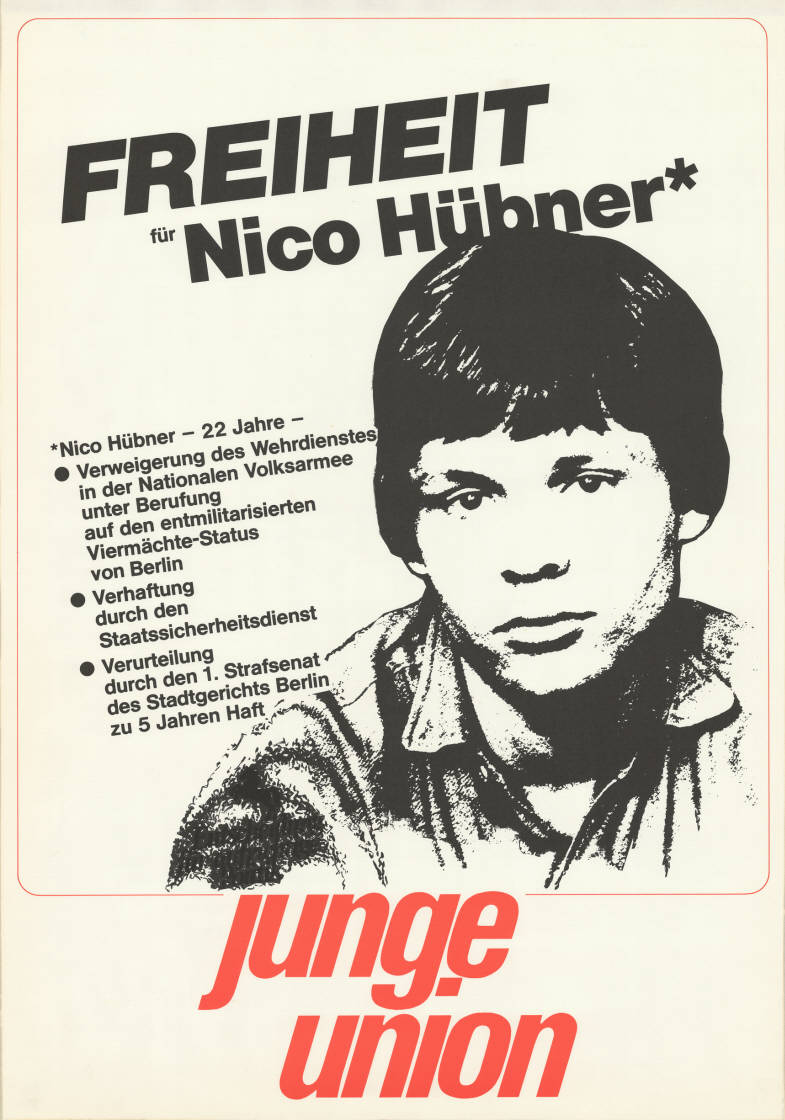 Freiheit für Nico Hübner* *Nico Hübner - 22 Jahre - . Verweigerung des Wehrdienstes in der Nationalen Volksarmee unter Berufung auf den entmilitarisierten Viermächte-Status von Berlin . Verhaftung durch den Staatssicherheitsdienst . Verurteilung ... zu 5 Jahren Haft junge union Abbildung: Porträtzeichnung Plakatart: Kandidaten-/Personenplakat mit Porträt Auftraggeber: JU Objekt-Signatur: 10-028 : 35 Bestand: Plakate von Jugendorganisationen der Parteien ( 10-028) GliederungBestand10-18: Plakate von Jugendorganisationen der Parteien (10-028) » CDU » Personen- und Kandidatenplakate Lizenz: KAS/ACDP 10-028 : 35 CC-BY-SA 3.0 DE